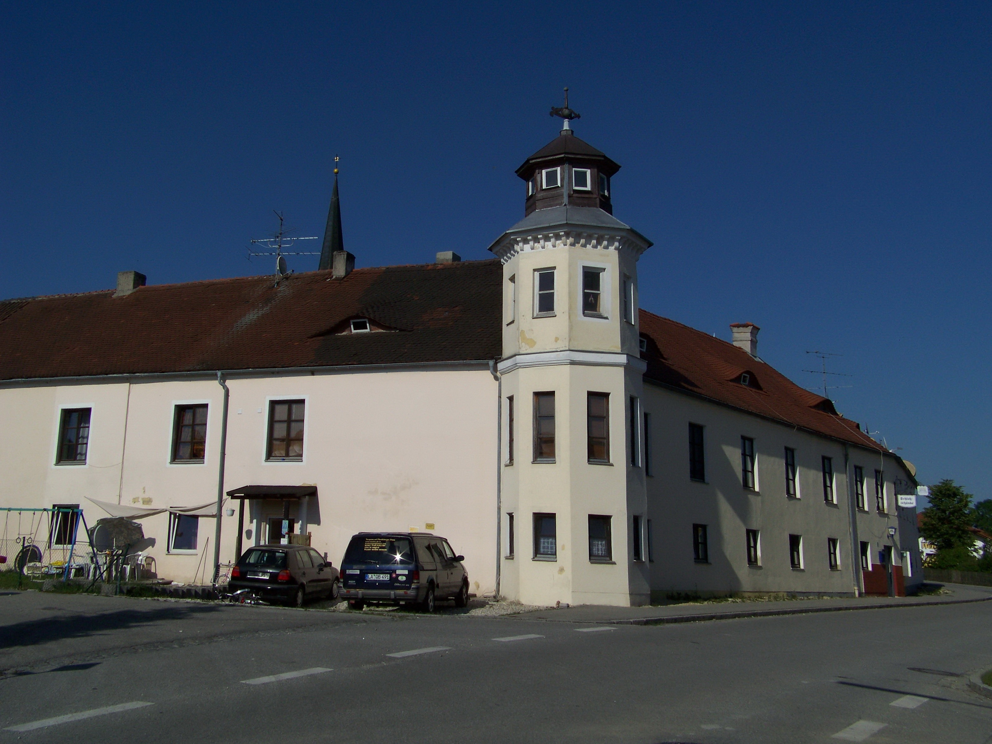 Weng, Hauptstrasse 17. Schloß, barocke unregelmäßige Vierflügelanlage, 18. Jahrhundert; mit Ausstattung; Stadel mit Walmdach und Blockbauwänden, wohl gleichzeitig.